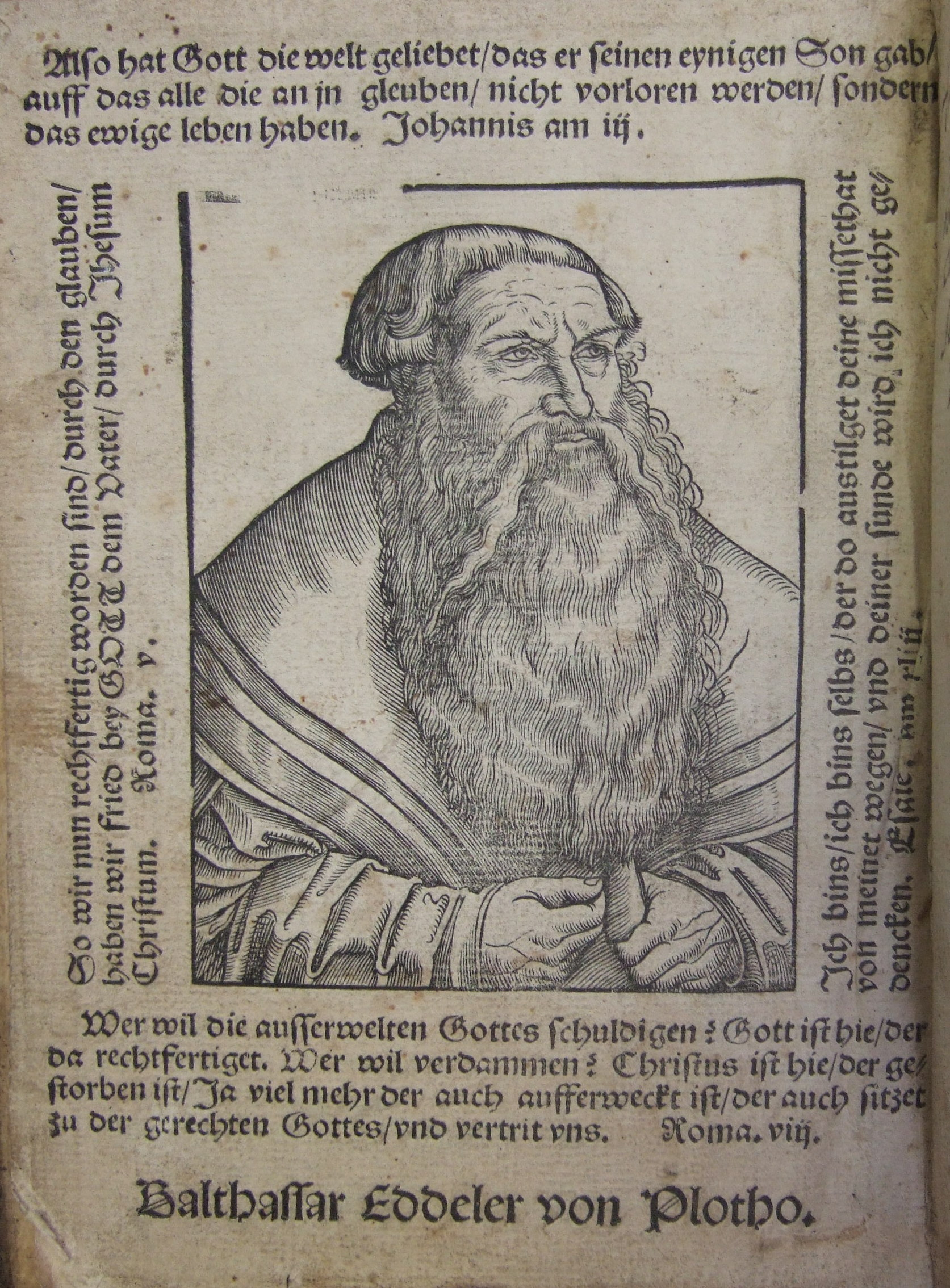 Ex libris se trouvant sur le premier contre-plat d'un livre de Martin Luther conservé à la médiathèque protestante de Strasbourg (P16-1366)